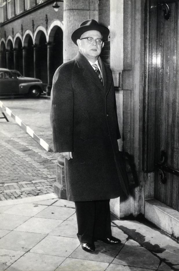 De heer H.A. Korthals (VVD) bij een ingang van de Eerste Kamer voor een gesprek met kabinetsformateur prof. de Quay. Nederland, Den Haag, 10 april 1959.